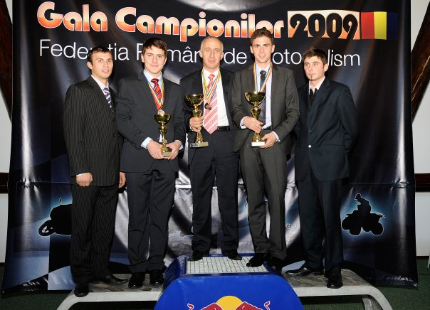 Dan M. Costescu - Campion Național la Rally-Raid, secțiunea Moto, Gala Campionilor, Cheile Grădiștei, 2009